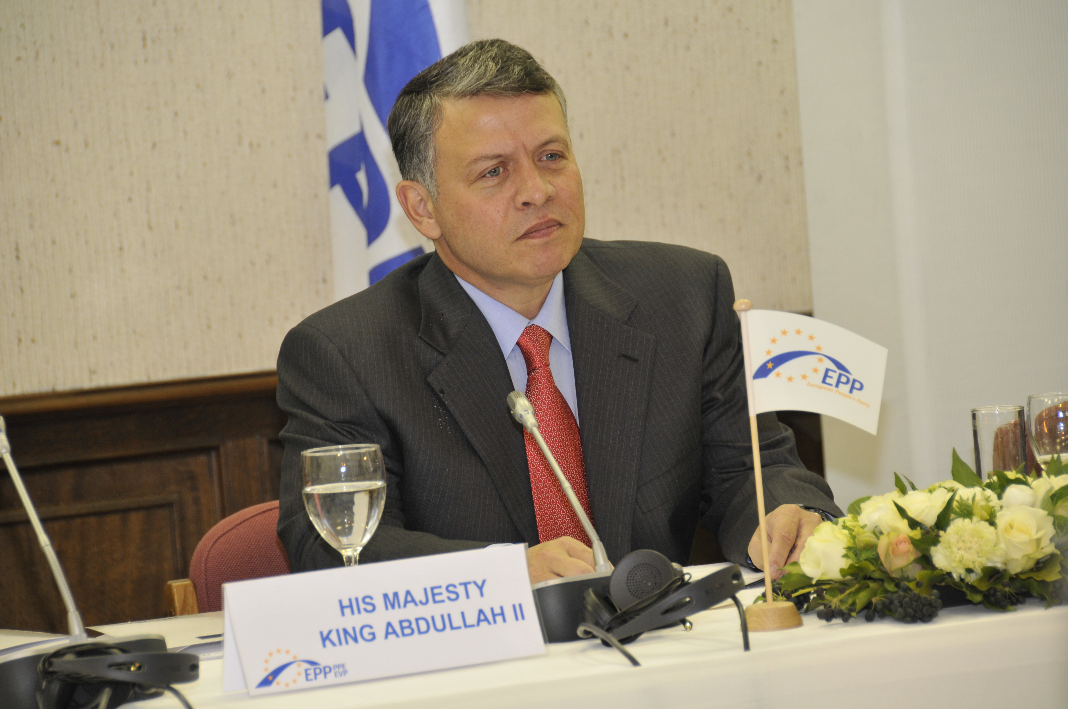 EPP Summit December 2010